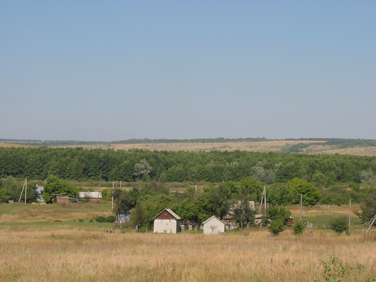 Панорама хутора Мрыховский со стороны дороги.